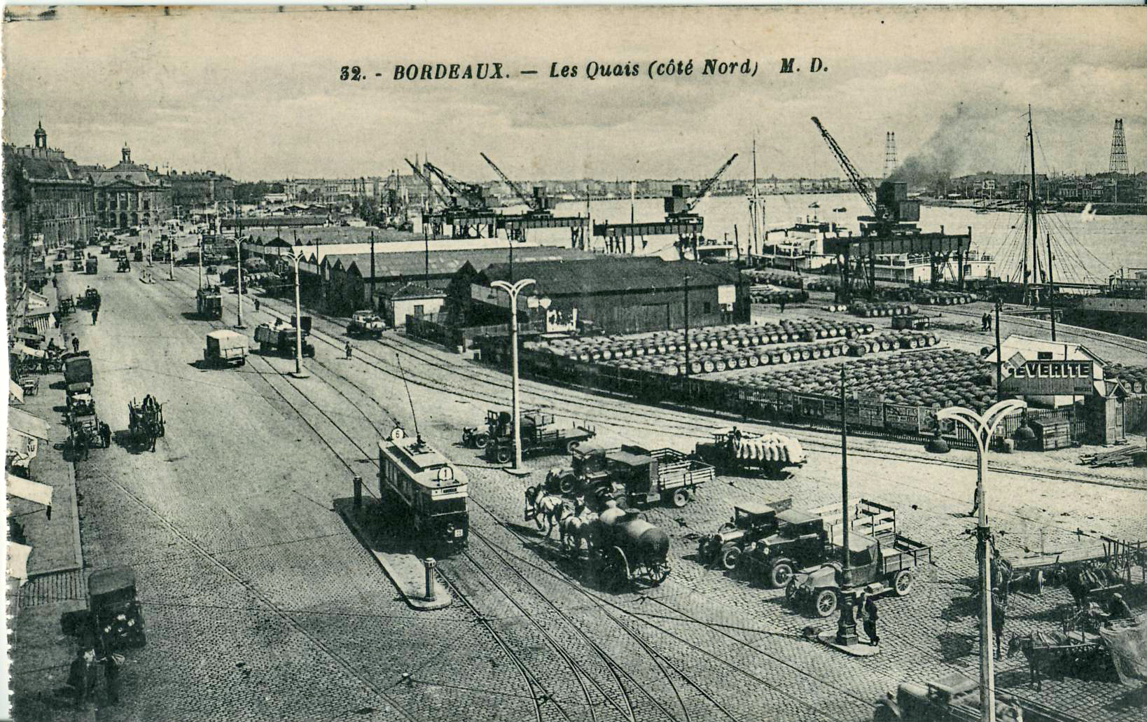 Carte postale ancienne éditée par Phototypie Marcel Delboy, 39 quai de la Rousselle à Bordeaux, n°32 :BORDEAUXLes Quais, côté nord.